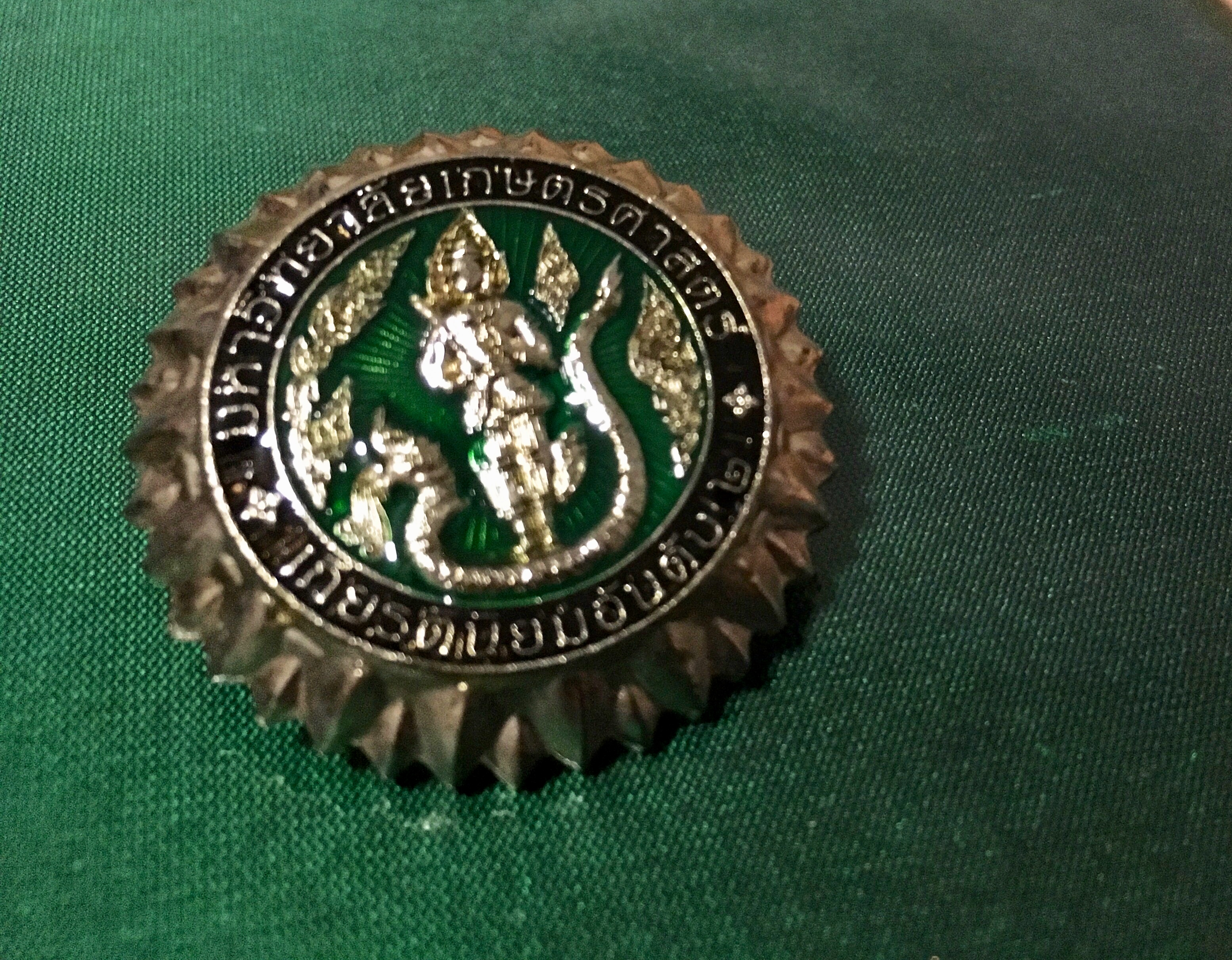 เข็มเกียรตินิยมอันดับสอง (สีเงิน) มหาวิทยาลัยเกษตรศาสตร์ กรุงเทพมหานคร